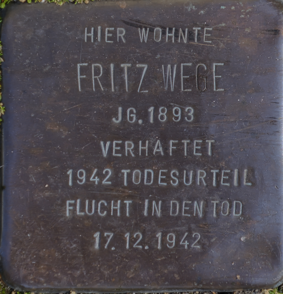 Stolperstein Solingen Ahornstraße 4 Fritz Wege